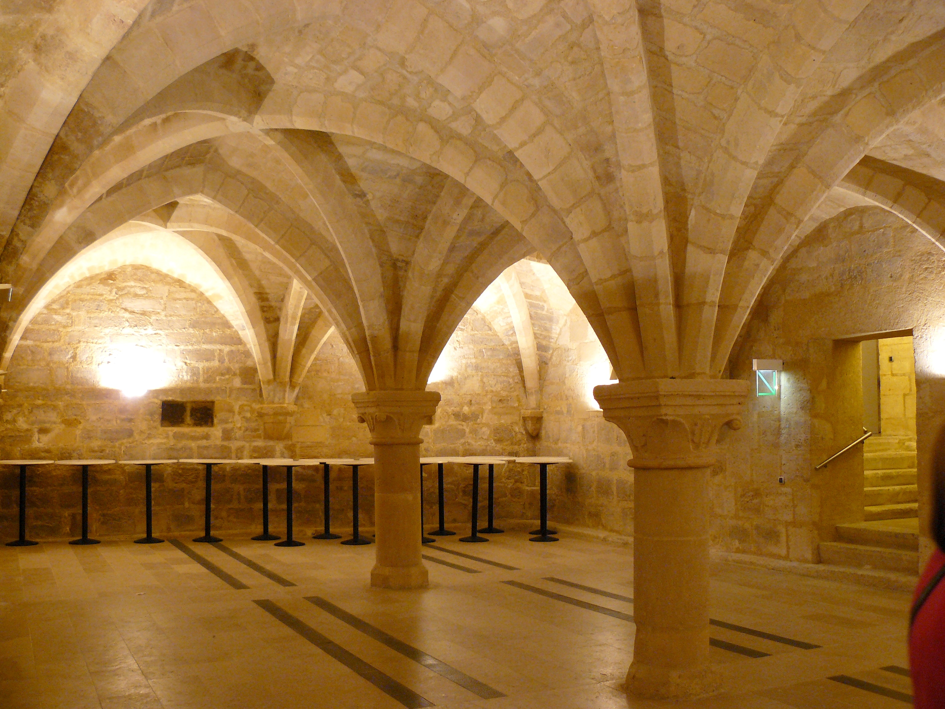 Cellier du XIIe siècle (cistercien) sous l'hôtel de Beauvais (68, rue François-Miron, Paris, 4e arrondissement)